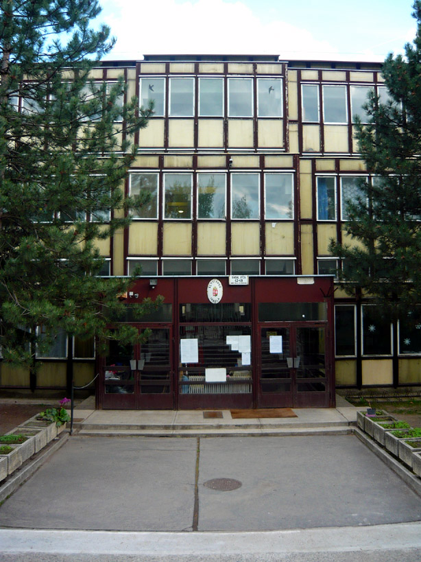 A Diadal utcai Általános Iskola főbejárata (Rákoscsaba-Újtelep, Budapest)